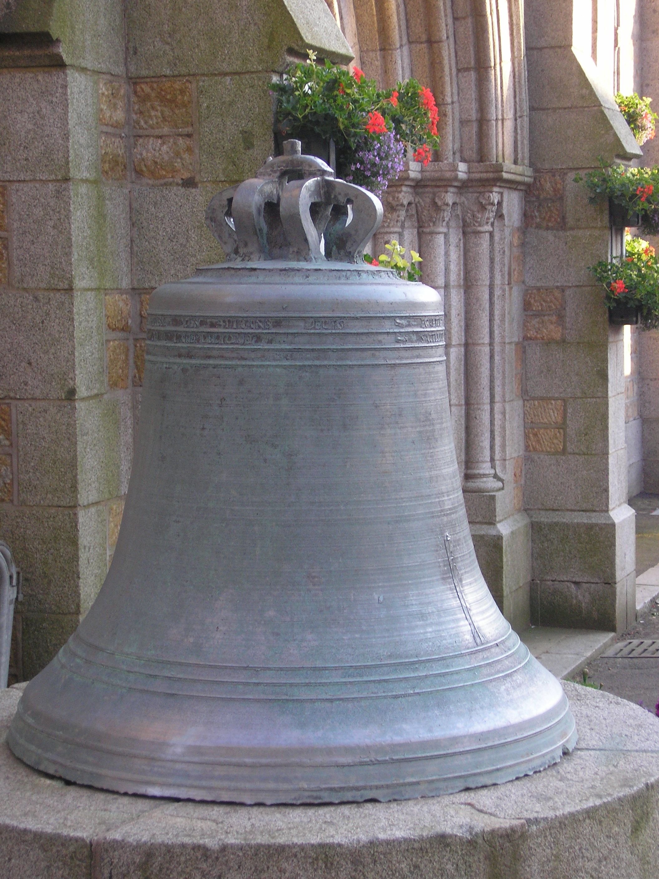 La Haye-Pesnel (Normandie, France). Cloche d'époque de la Révolution française. Elle porte l'inscription : Egalité , liberté, vive la République Françoise ! Vive les patriotes perisse les tirans leurs satellites et tous les aristocrates. Date : May 1793 l'an II de la République.